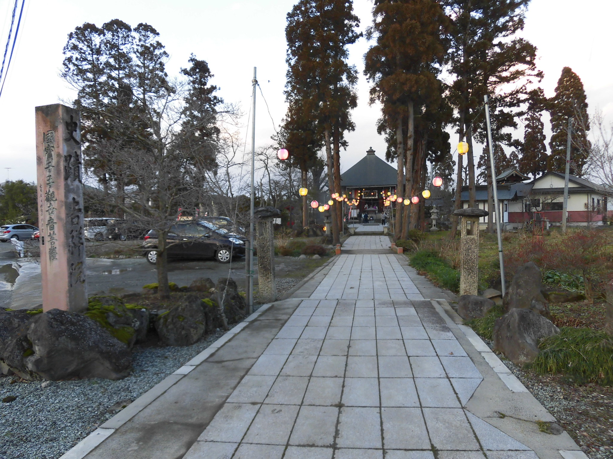 吉祥院（きちじょういん）の参道からの風景。山形県山形市千手堂に所在。 最上三十三観音第三番札所。